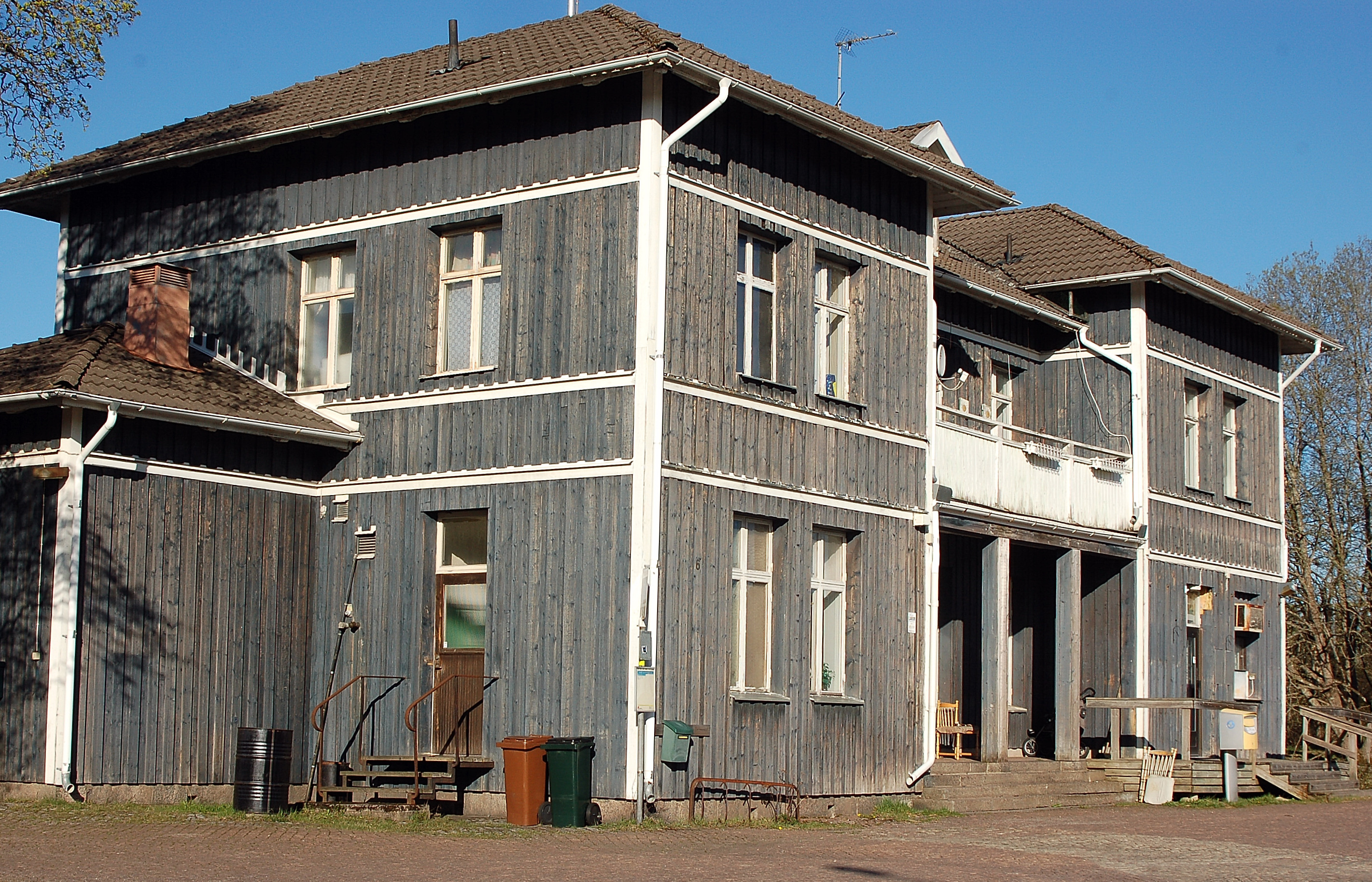 Strömtorps järnvägstation, Degerfors.